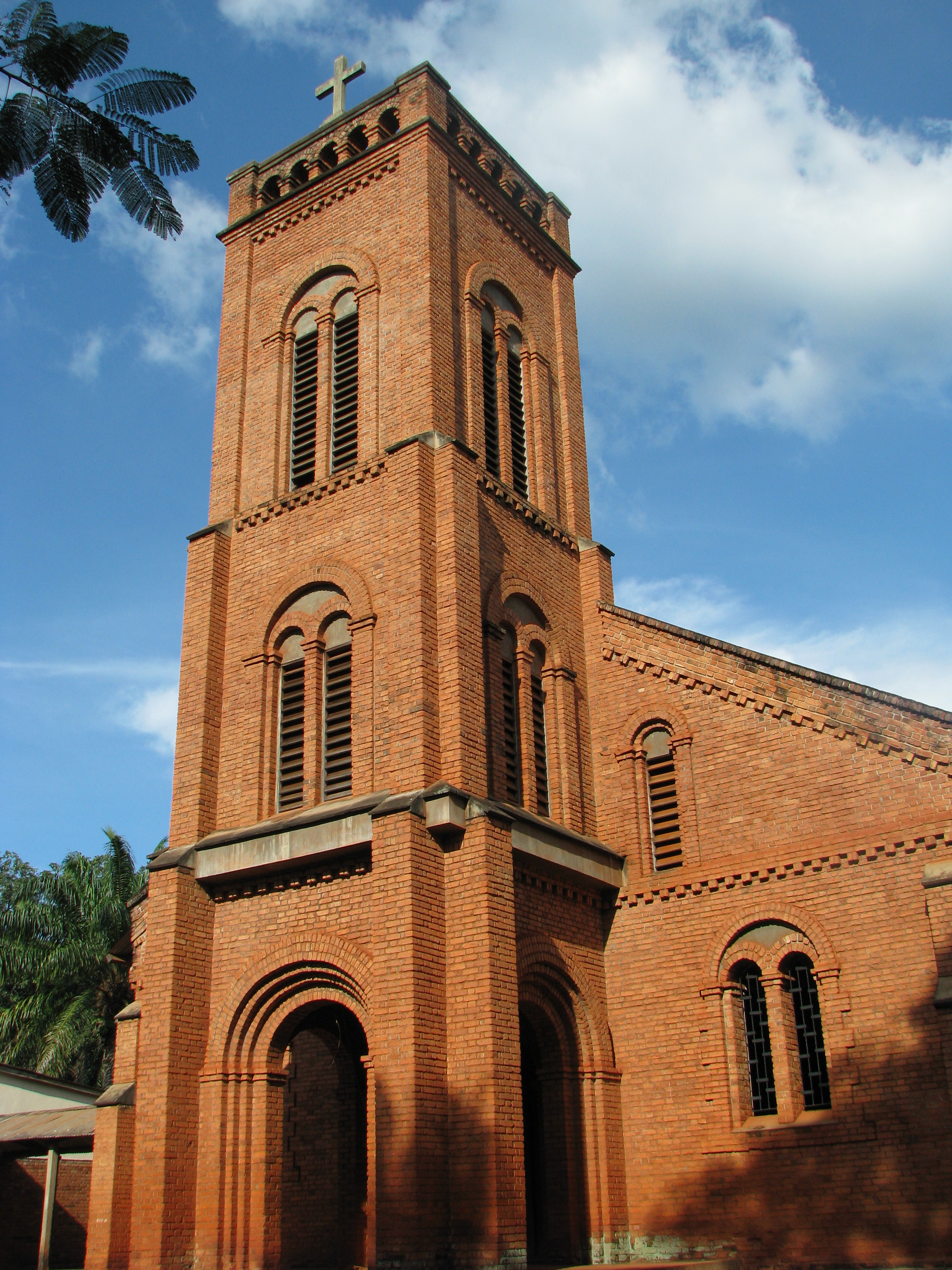 Catedral San Pedro Claver, sede de la diócesis católica de Bangassou (República Centroafricana)